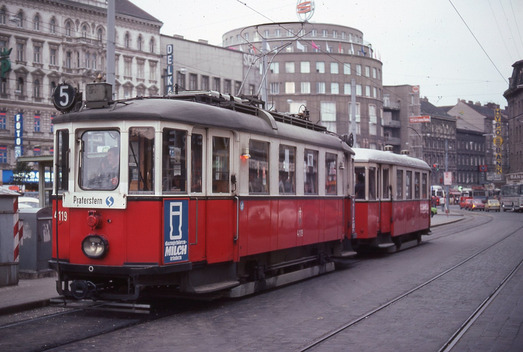 M 4119 und m3-Beiwagen auf Linie 5 in der Mariahilfer Straße beim Wiener Westbahnhof. Im Hintergrund das Kaufhaus Stafa